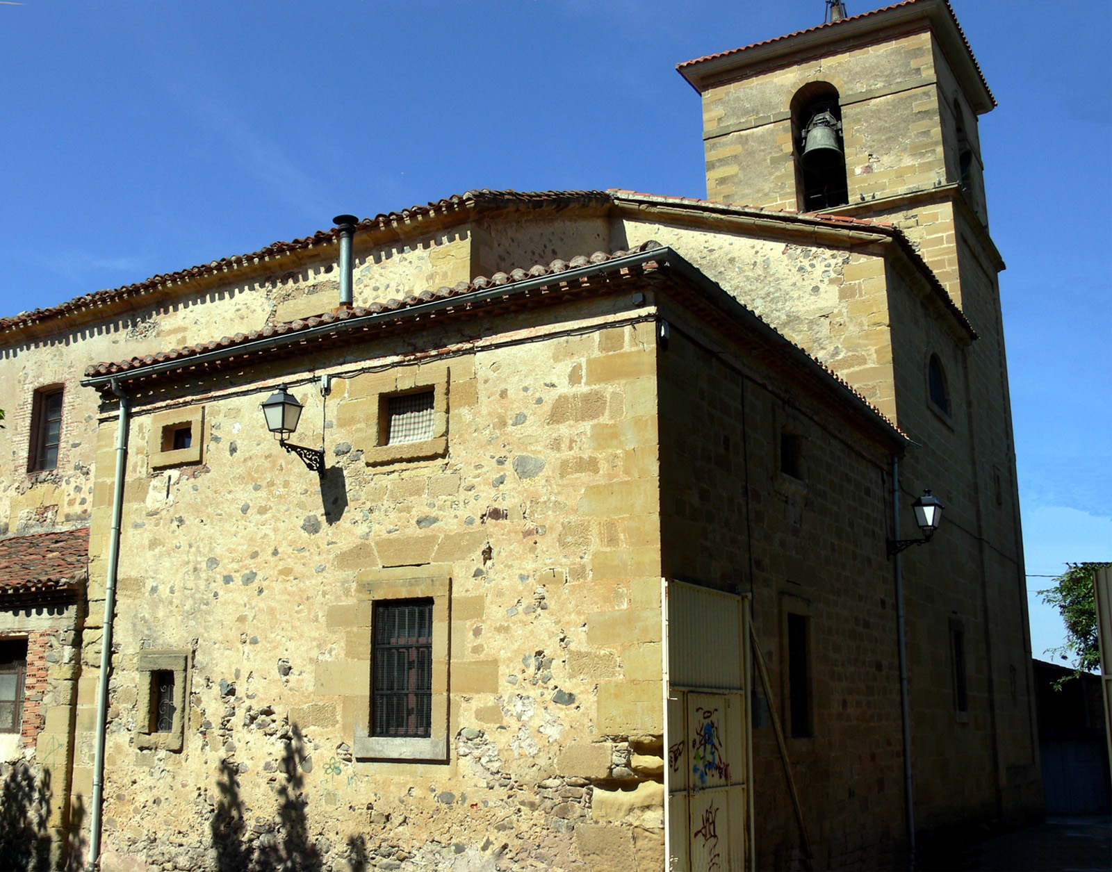 Iglesia de San Jorge en Santurdejo (La Rioja - España)